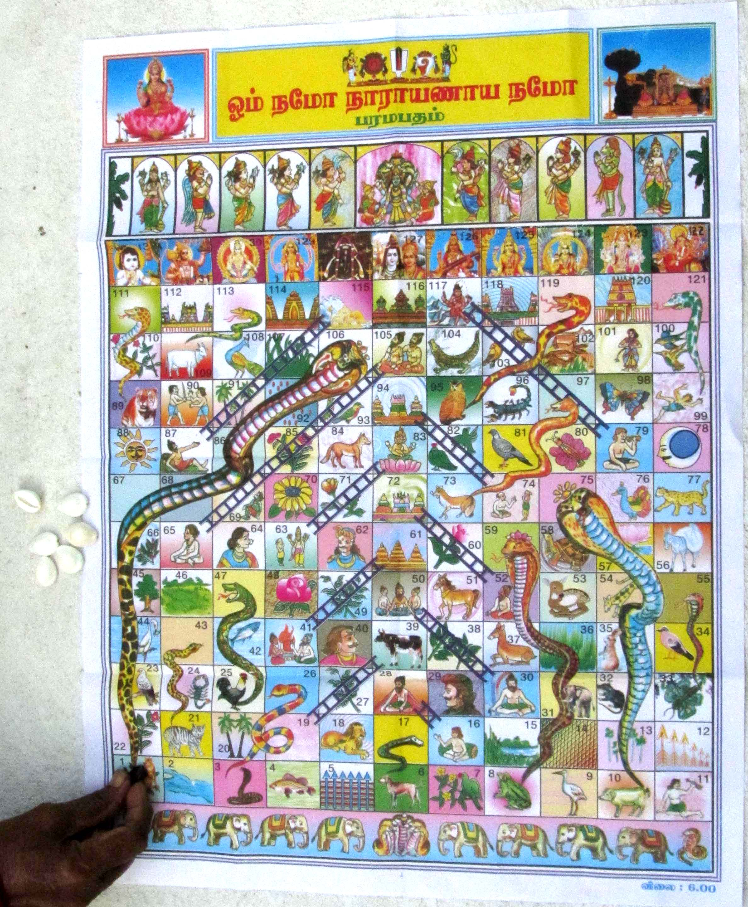 own shot - பரம்பதம் விளையாட்டு. எல்லா வயதினரும் கலந்துகொள்ளும் பொழுதுபோக்கு விளையாட்டு. தாயக் காய்களை உருட்டி விழும் எண்ணிக்கைக்கு ஏற்ப அவரவர் காய்களை நகர்த்துவர். ஏணியின் அடியில் காய் இருந்தால் அதன் உச்சிக்கு ஏறிக்கொள்ளலாம். பாம்பின் வாய்க் கட்டத்தில் இருந்தால் அதன் வால்-கட்டத்துக்கு இறங்கிவிட வேண்டும். உச்சி வரிசைக்கு ஏறிய பின் ஒவ்வொரு தாயமாகப் போட்டுப் பரம்பதத்தை அடைய வேண்டும். தாயம் என்பது எண் ஒன்று.